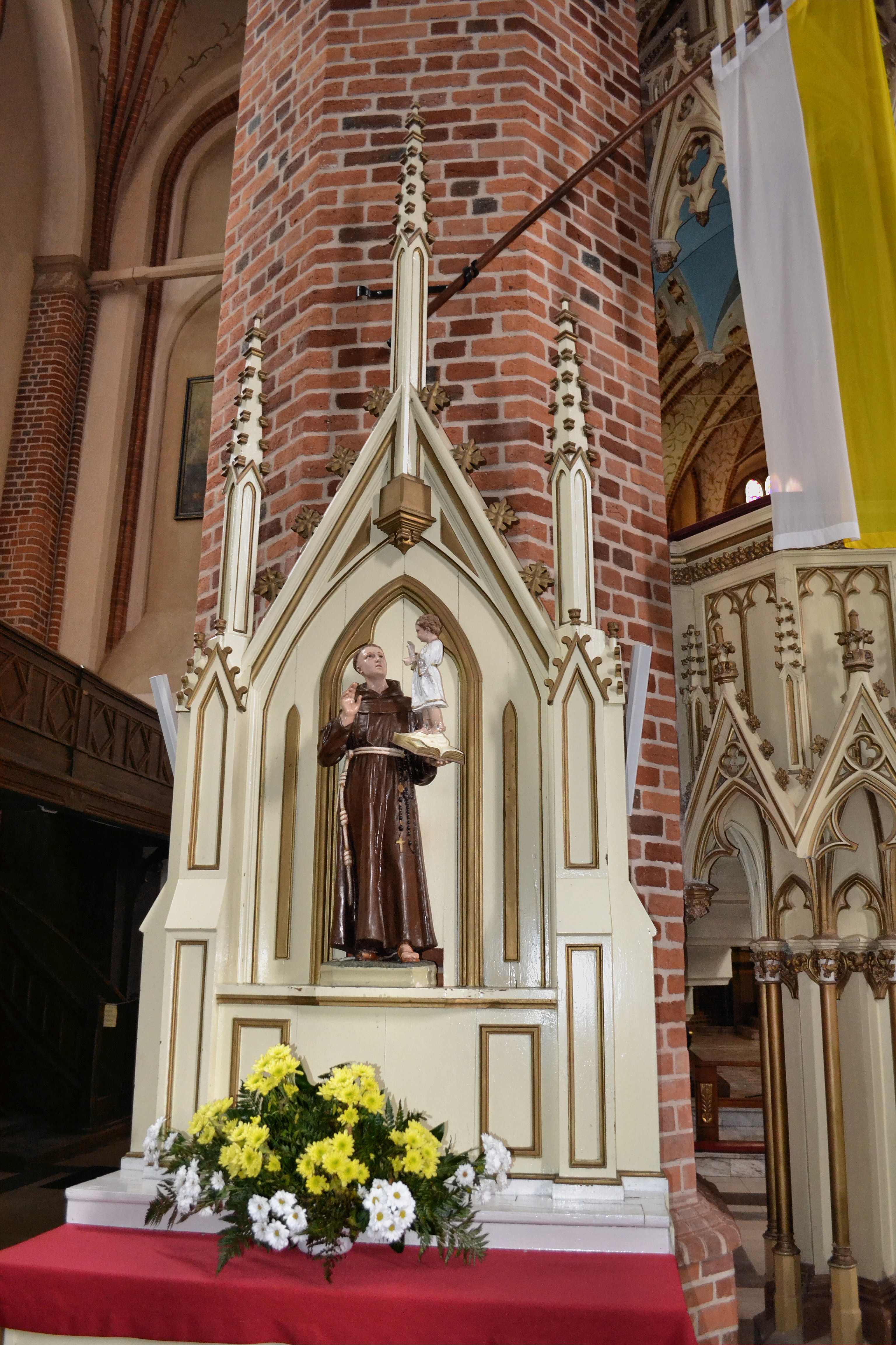 kościół Macierzyństwa NMP Trzebiatów